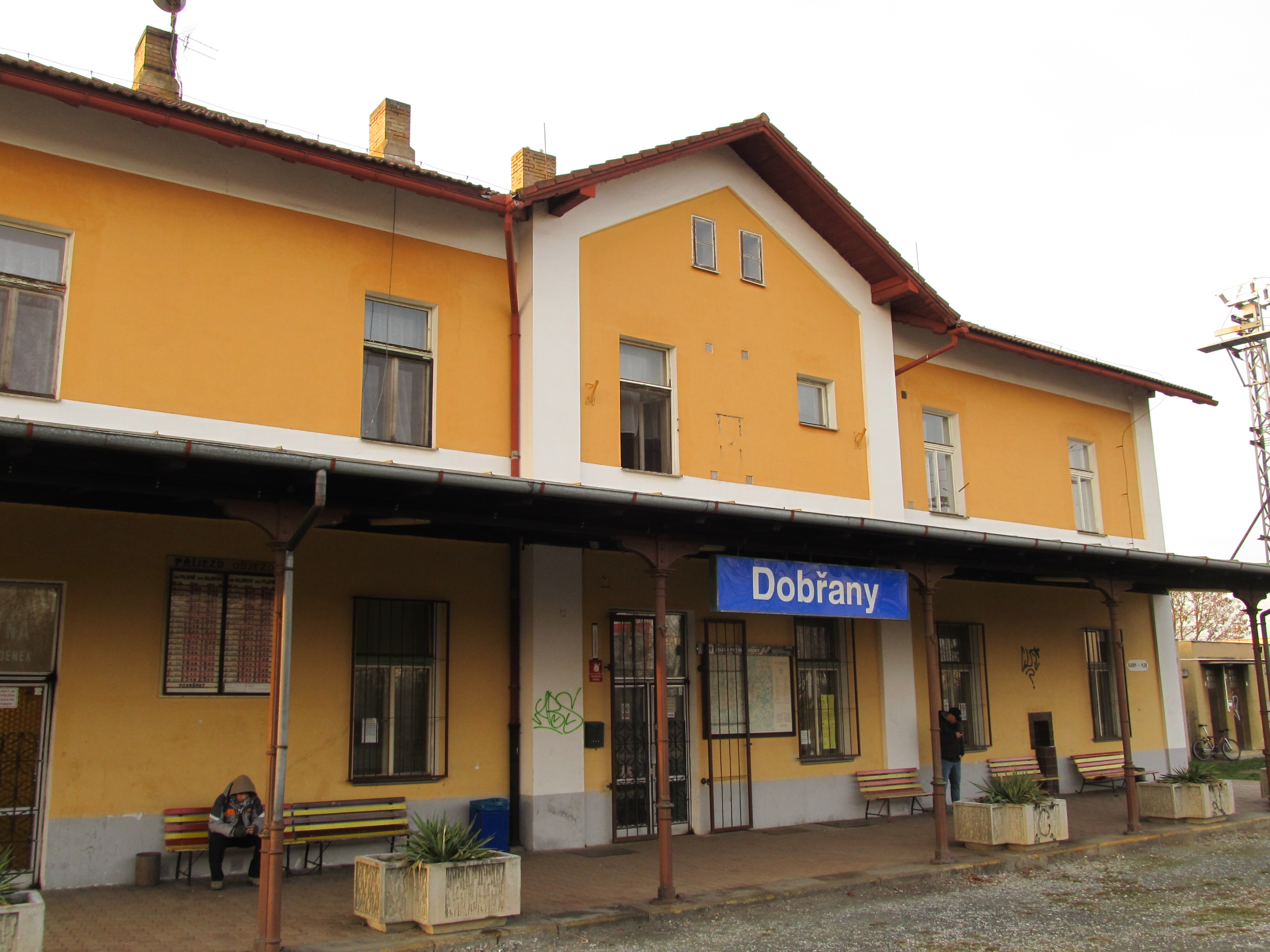 Dobřany - železniční stanice